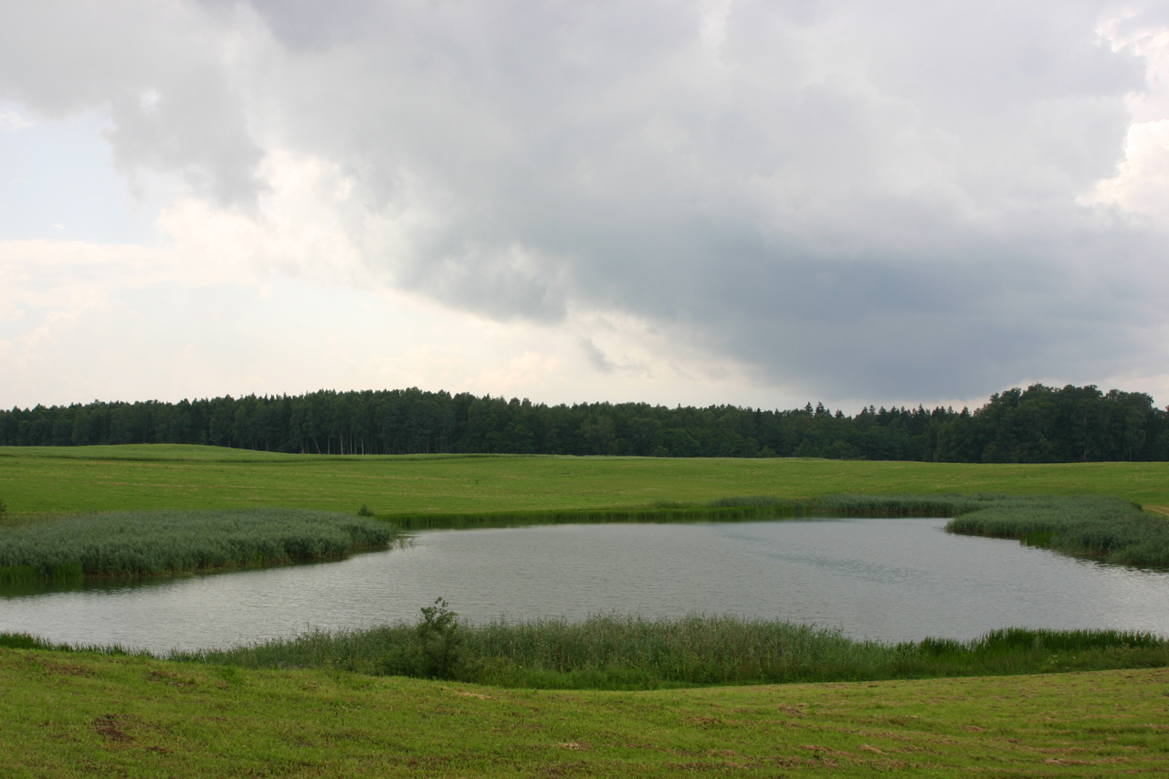 Kąty, Polska, powiat kętrzyński.